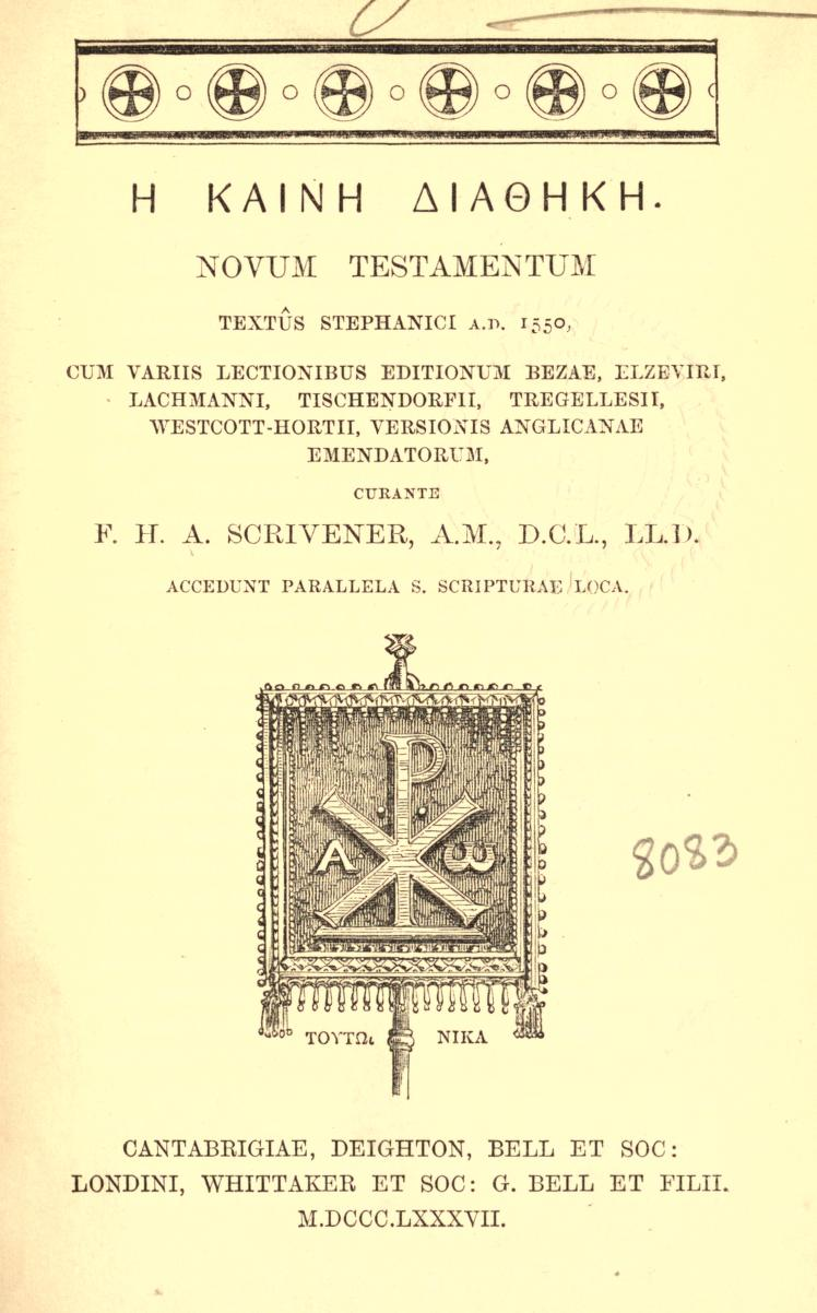 Titelseite